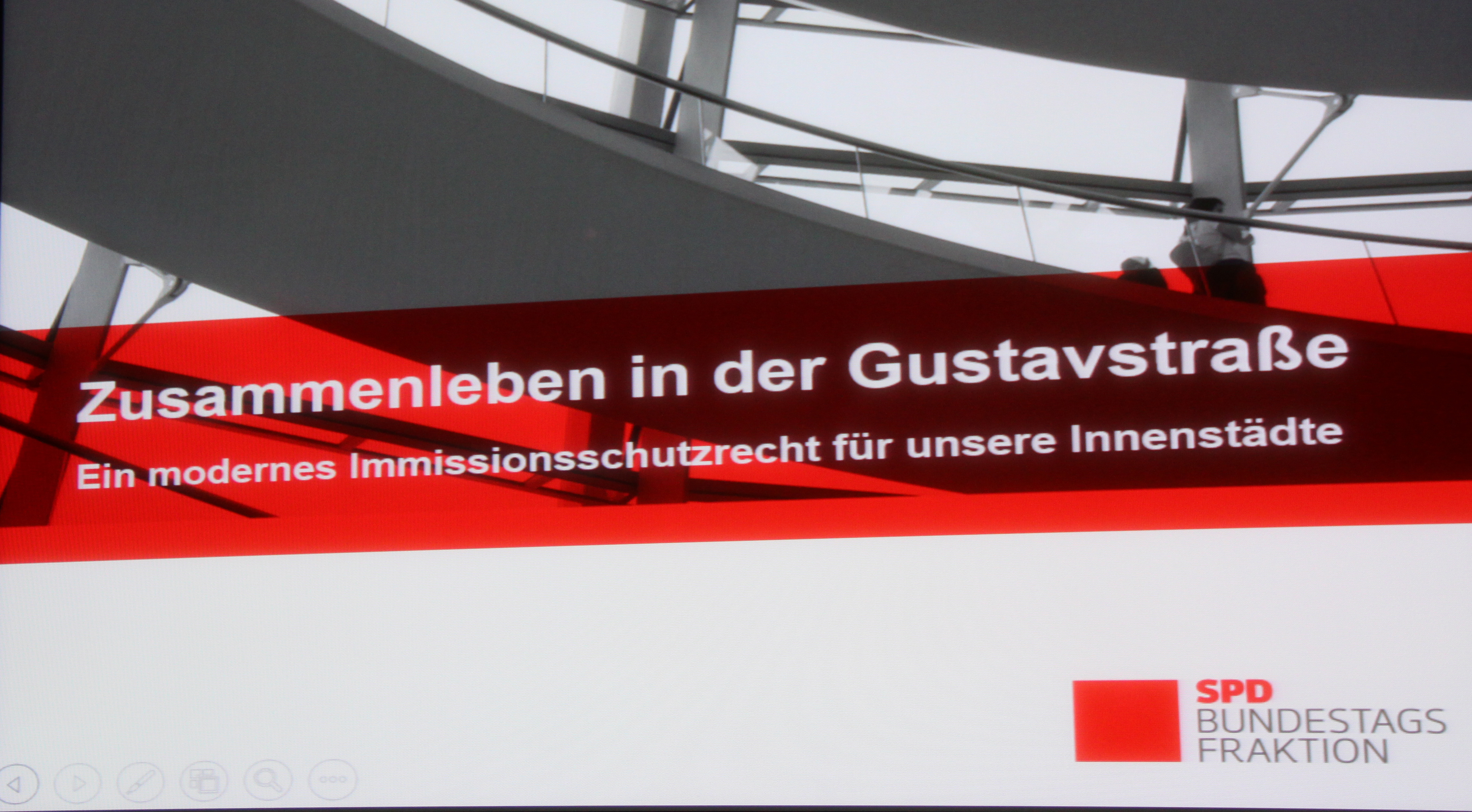 Veranstaltung der SPD Bundestagsfraktion zur Gustavstraße Fürth